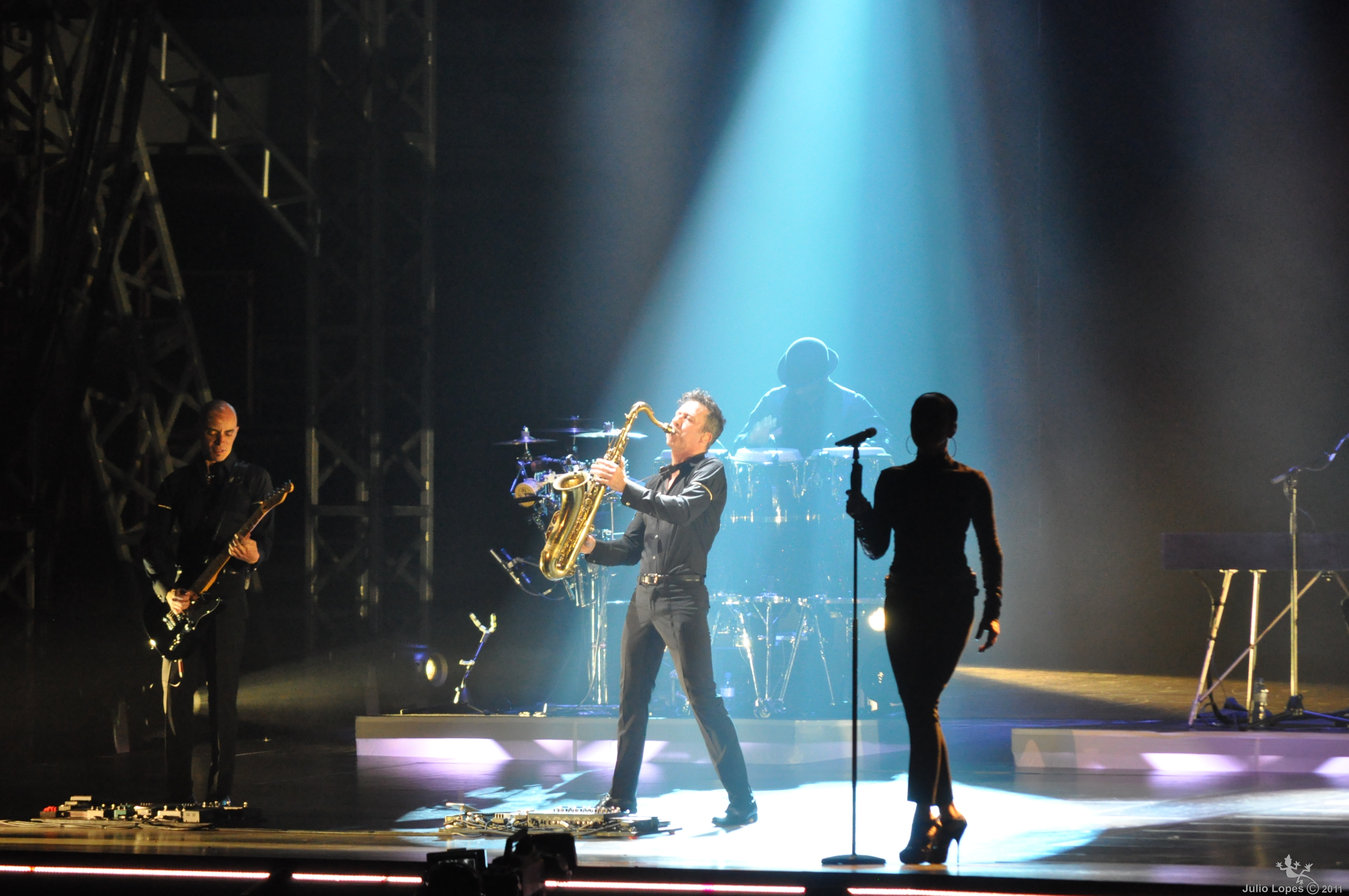 Show Sade Adu Brasília - Outubro 2011